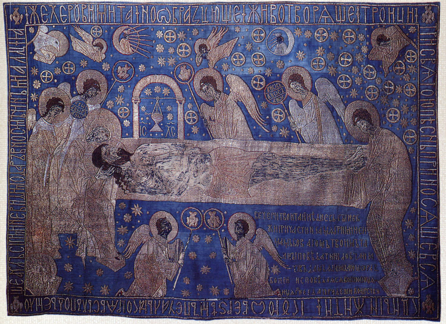 Плащаница. Положение во гроб. Начало XV в. Материал: Камка, золотные, серебряные и шелковые нити. Место хранения: Сергиево-Посадский государственный историко-художественный музей-заповедник Происхождение: Поступила в 1920 г. из Троице-Сергиевой лавры. Размер: 136 x 183 Сохранность и реставрация: Древний фон (синий атлас) утрачен и виден только по абрису рисунка и в местах значительных утрат шитья. Плащаница была в реставрации в ЦГРМ в 1920-х гг. (реставратор А. Д. Меркулова) и в 1973-1974 гг. в ГЦХНРМ (реставраторы М. П. Рябова и А. Н. Белякова). Описание: На плащанице изображена сцена оплакивания Христа. Слева у гроба изображены Богоматерь и два ангела с рипидами, справа - Иоанн Богослов и два ангела. Перед гробом вышиты два коленопреклоненных ангела, за гробом киворий с лампадой. В верхней части композиции вышиты плачущие ангелы, персонификации Солнца и Луны. В углах - символы евангелистов. Фон зашит звездами и четырехконечными крестами в кругах. Внизу на среднике и по кайме - литургические надписи. Личное шито телесным шелком "в раскол", волосы - светло-коричневым. Все остальное - золотными и серебряными нитями "в прикреп" простыми швами ("клопчик" и "городок"). Складки одежд и другие детали обозначены красным шелком. Подкладка из синей крашенины.